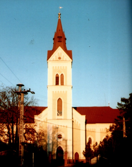 Református templom, Nagyecsed